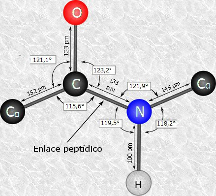 Estructura del enlace peptídico